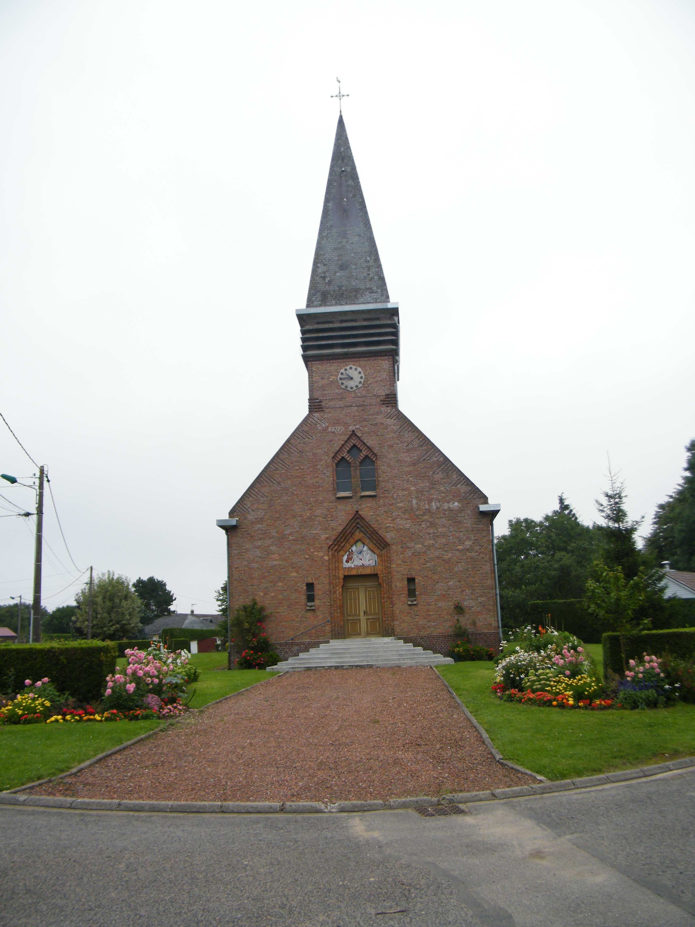 Église Saint-Martin.